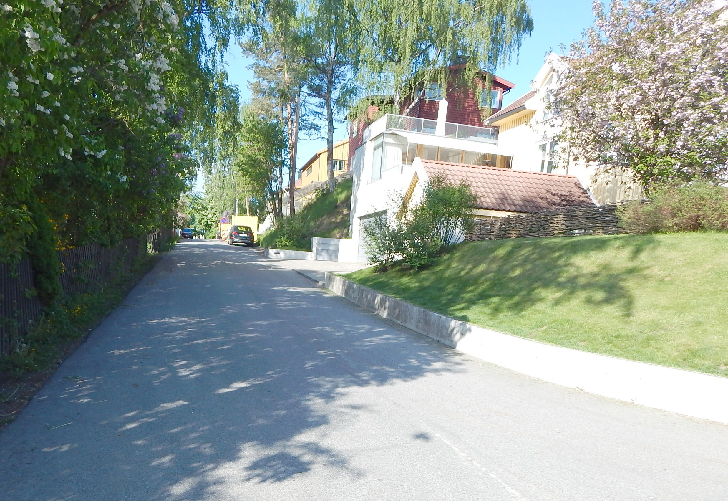 Elmholtveien sett fra Adventveien